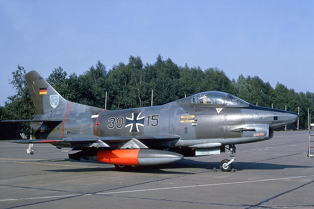 Luftwaffe 1973